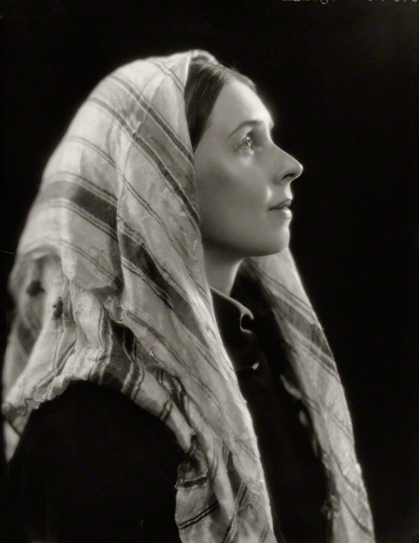 Lydia Lopokova